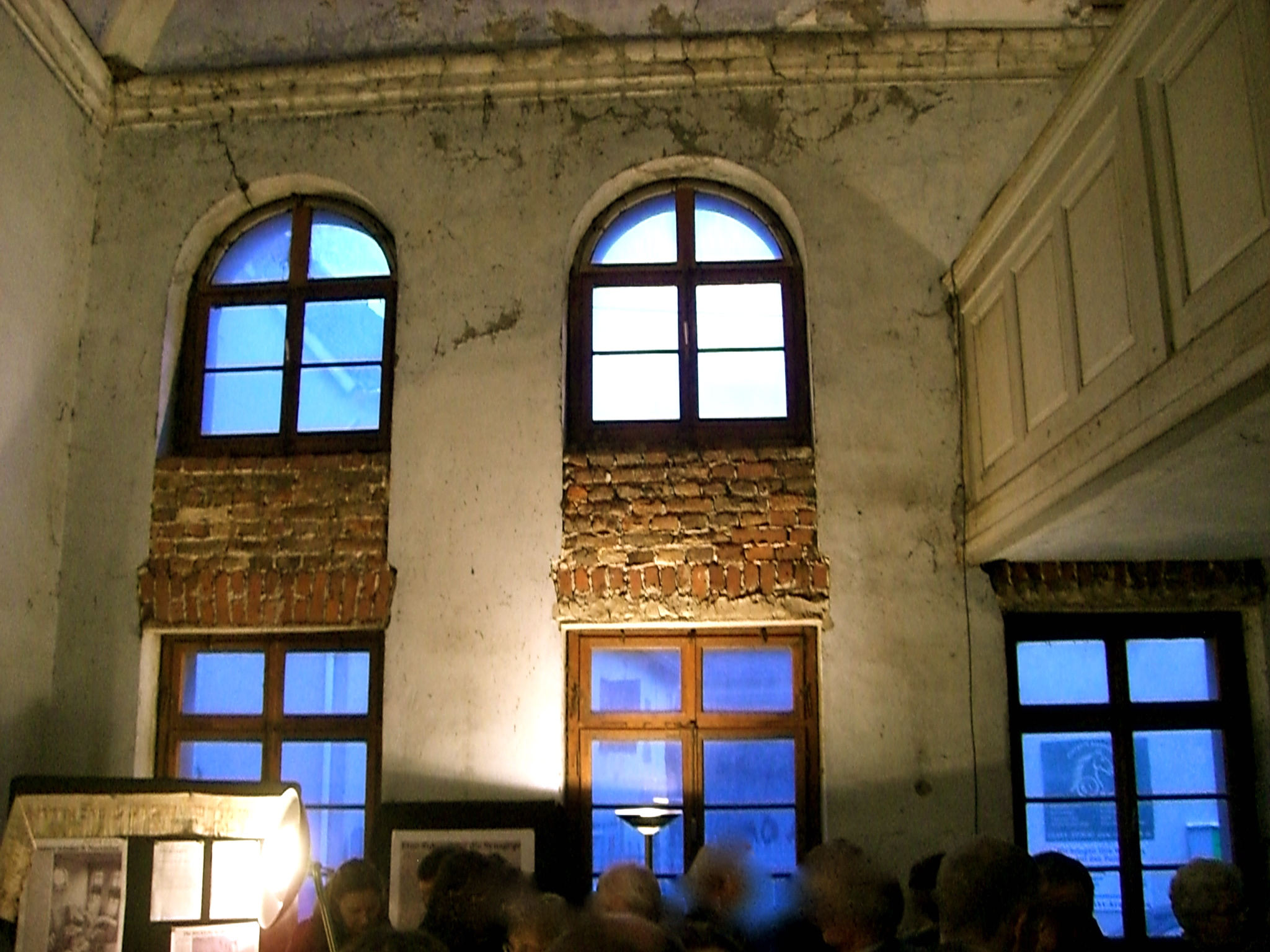 Interior of Synagogue in Schupbach